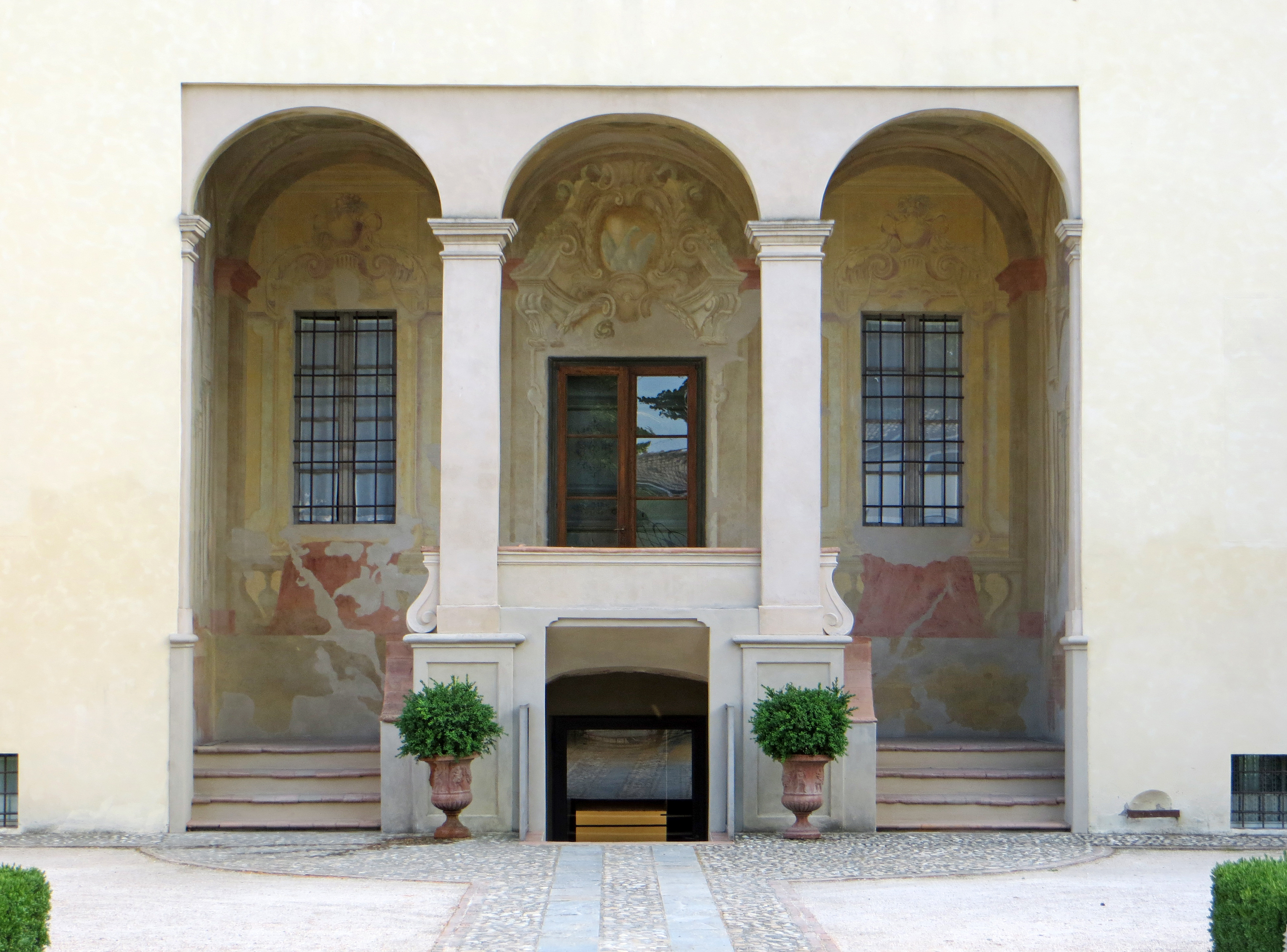 Villa Castellina (Castellina, Soragna) - porticato della facciata nord